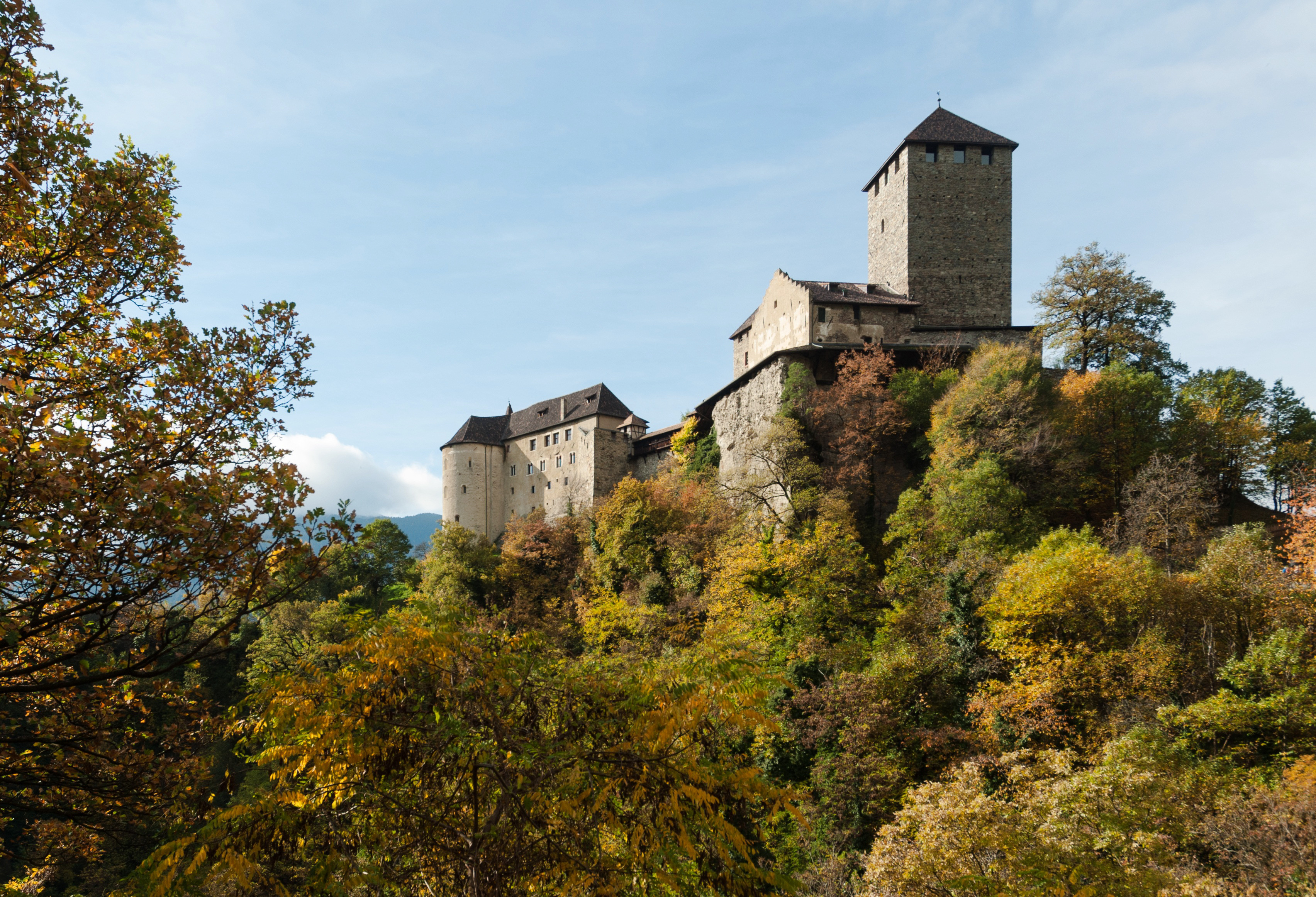 Nordostansicht von Schloss Tirol